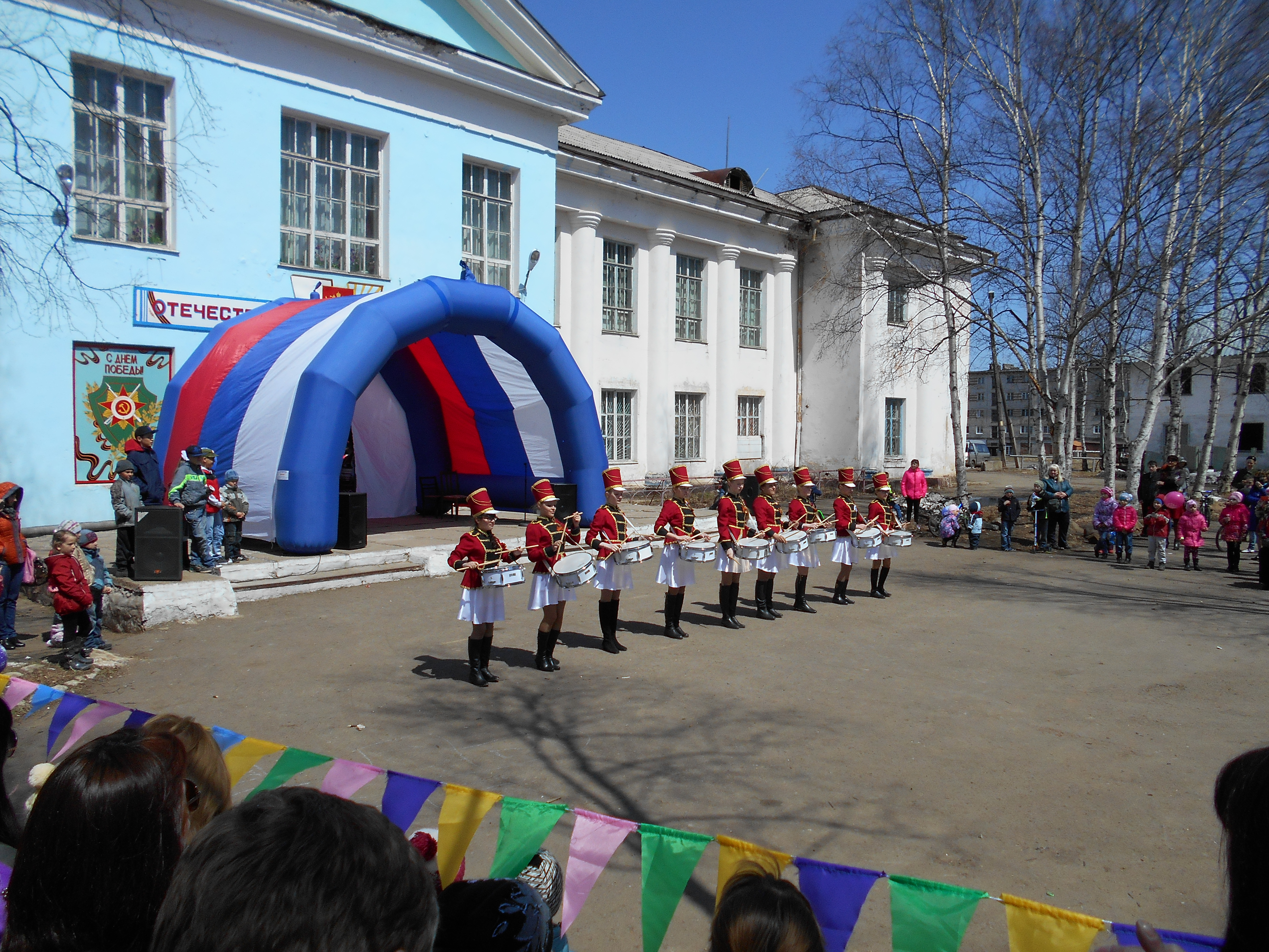 Праздник 9Мая 2015 года